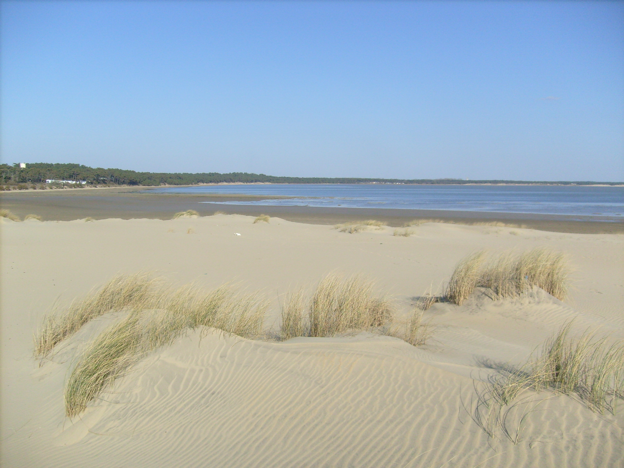 La pointe de la Coubre (Charente-Maritime)